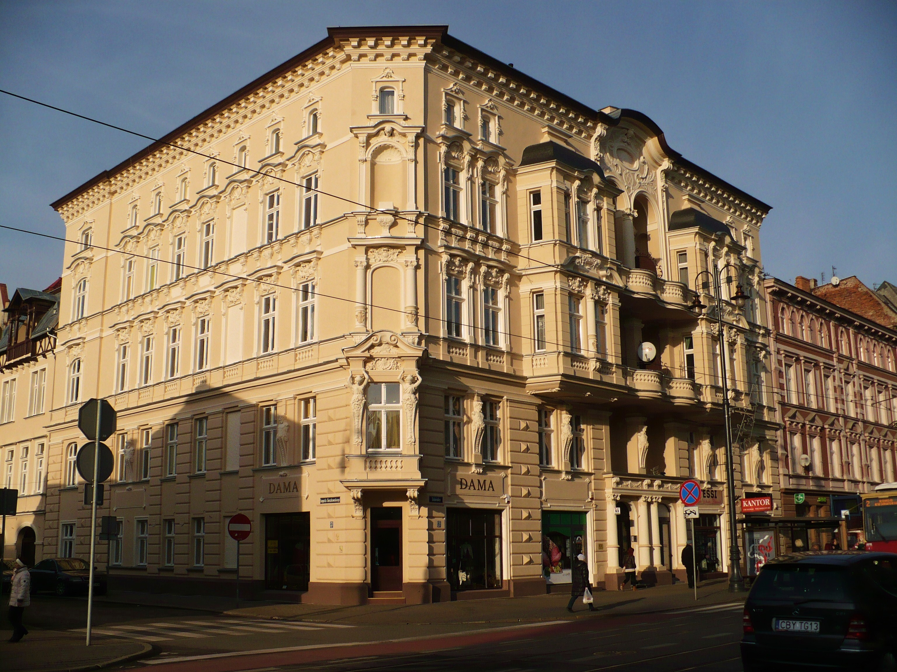 Kamienica w stylu eklektycznym z przewagą form neorenesansowych i neobarokowych na ulicy Gdańskiej 63 w Bydgoszczy